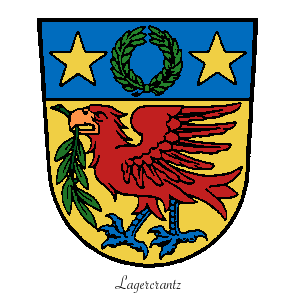 Modern variant av adliga ätten Lagercrantz N:o 1011 vapensköld.